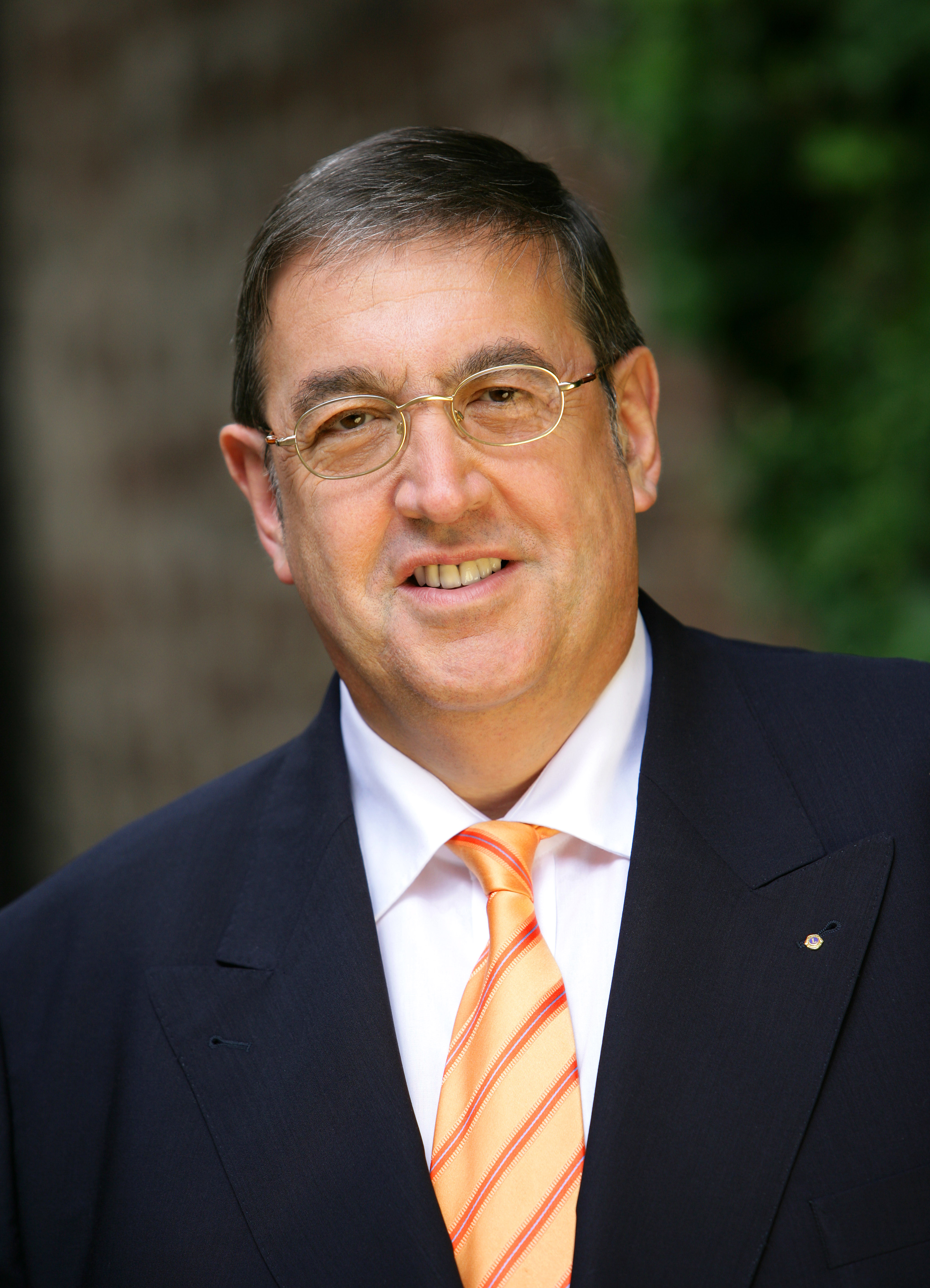 Karl Lamers, CDU-Bundestagsabgeordneter